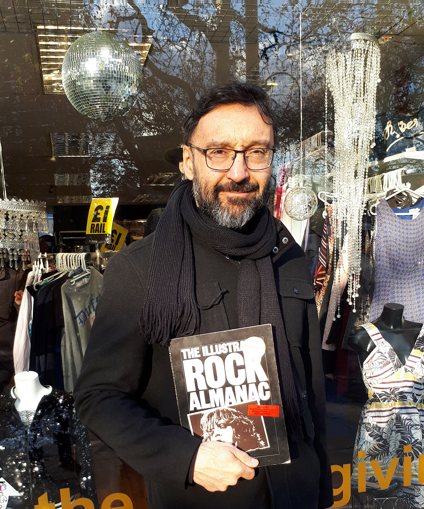 Alejandro Colucci en Londres